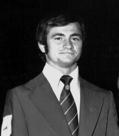 Nicu Gingă